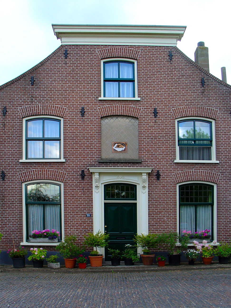 Het ouderlijk huis van de schrijver Herman de Man, Dorp 224 te Benschop (het: Herman de Manhuis)